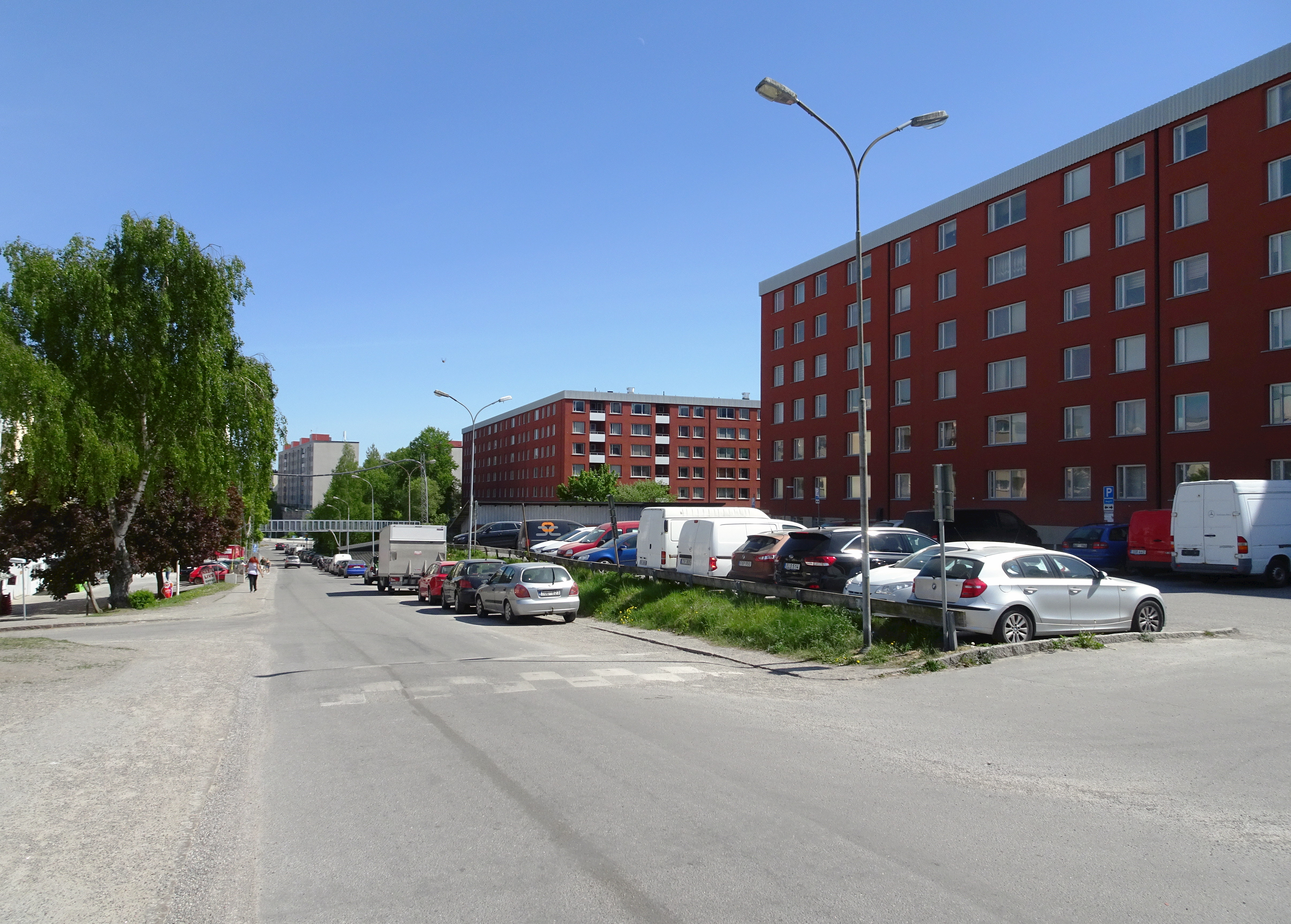 Visättra, Huddinge kommun (Visättravägen)